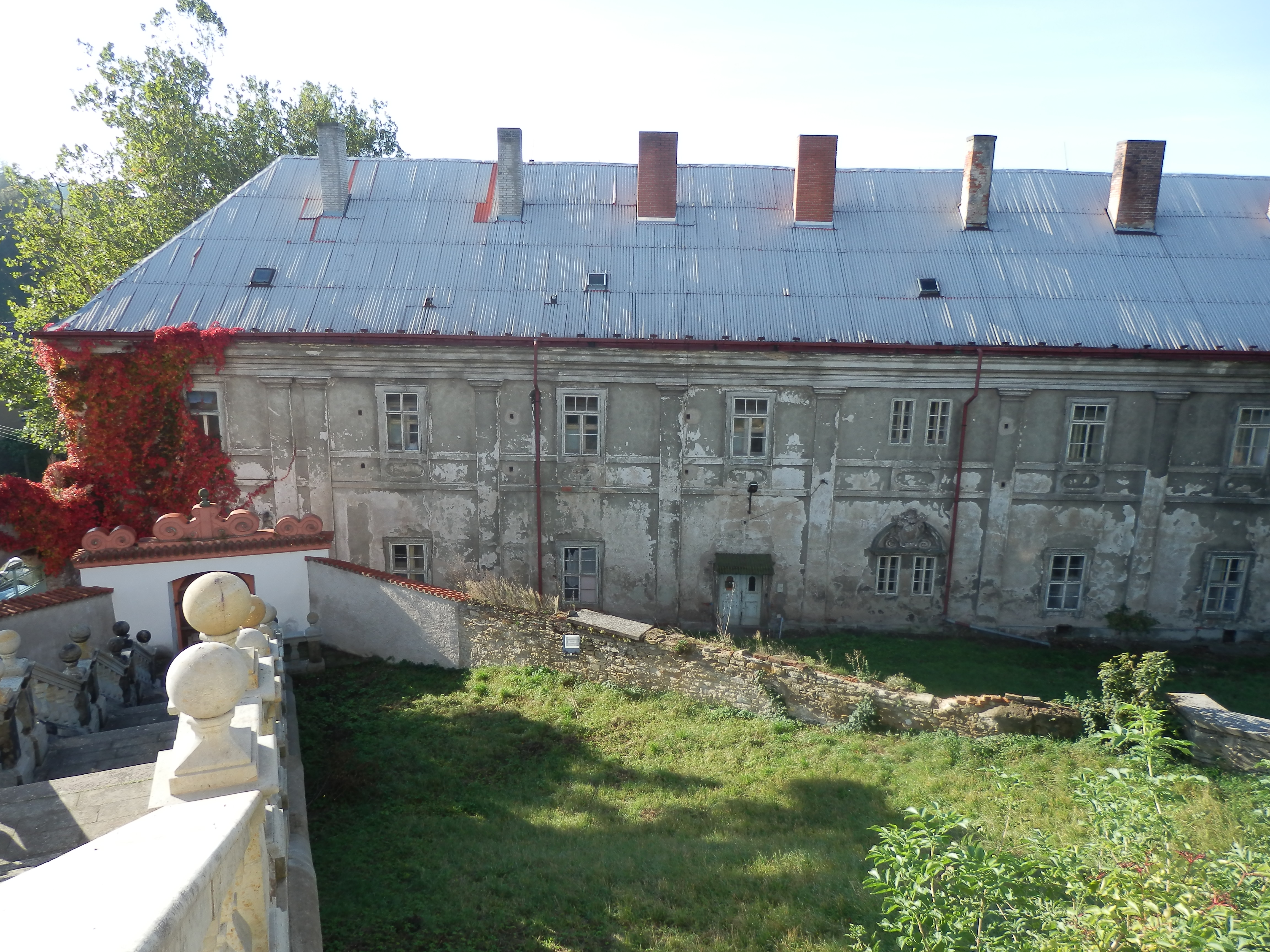 Rezidence jezuitská (Luže), ul.? 13, Luže